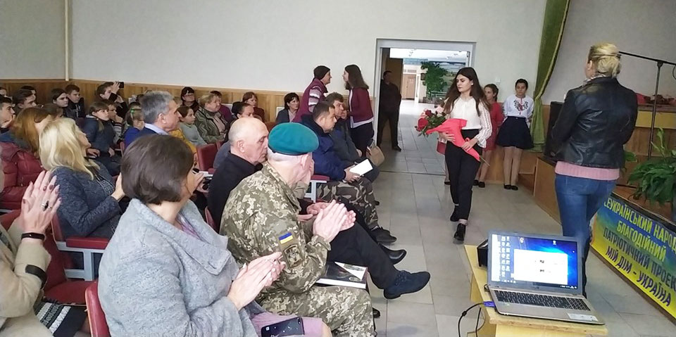 Урок мужественности в Марьевской школе